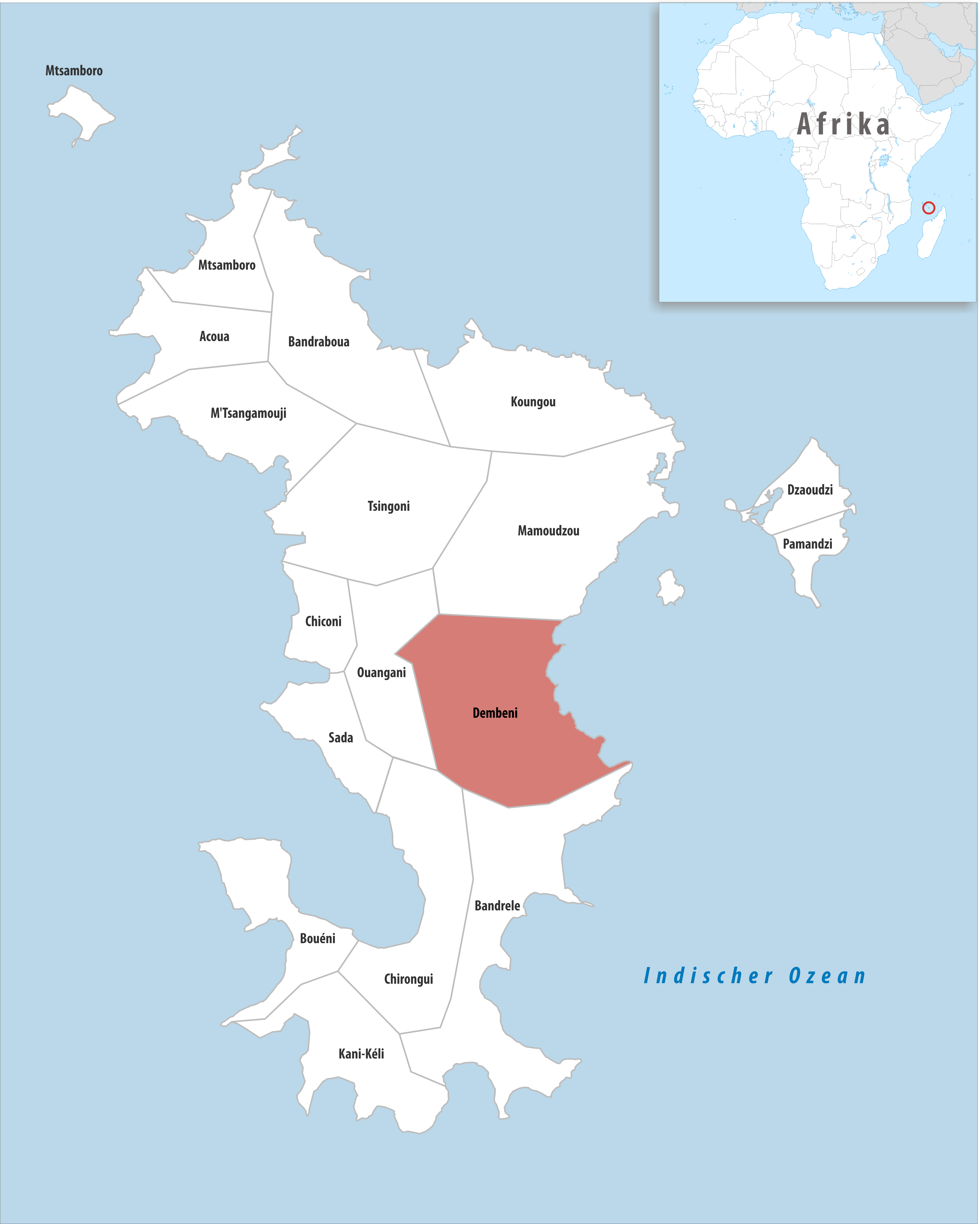 Lage der Gemeinde Dembeni